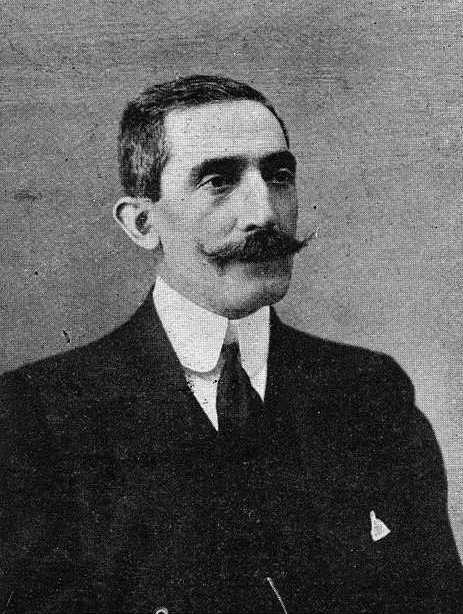 Eladio de Lema Martín, fotografía en Vida Gallega 1917